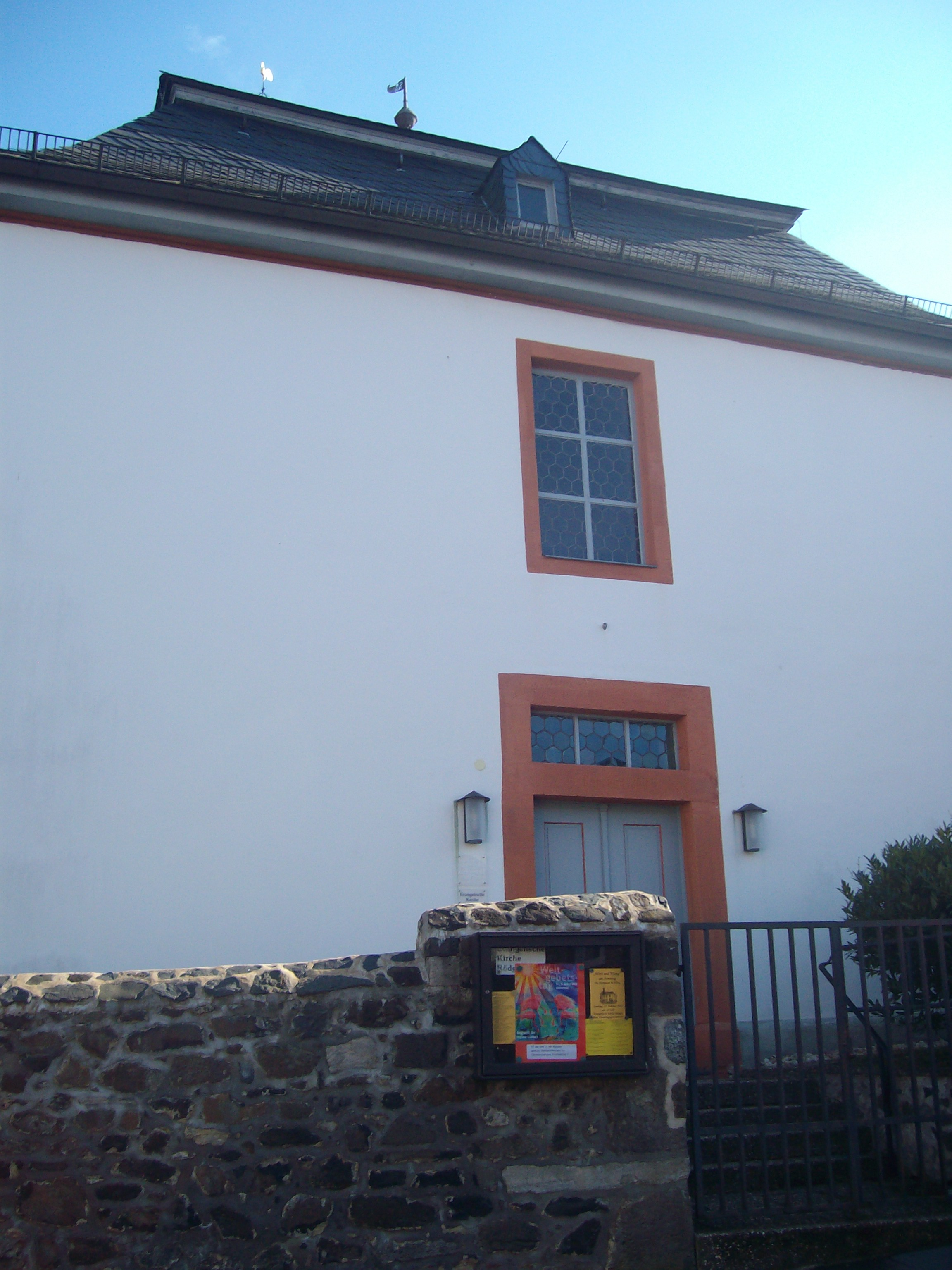 Evangelische Kirche Gießen-Rödgen, Hessen, Deutschland